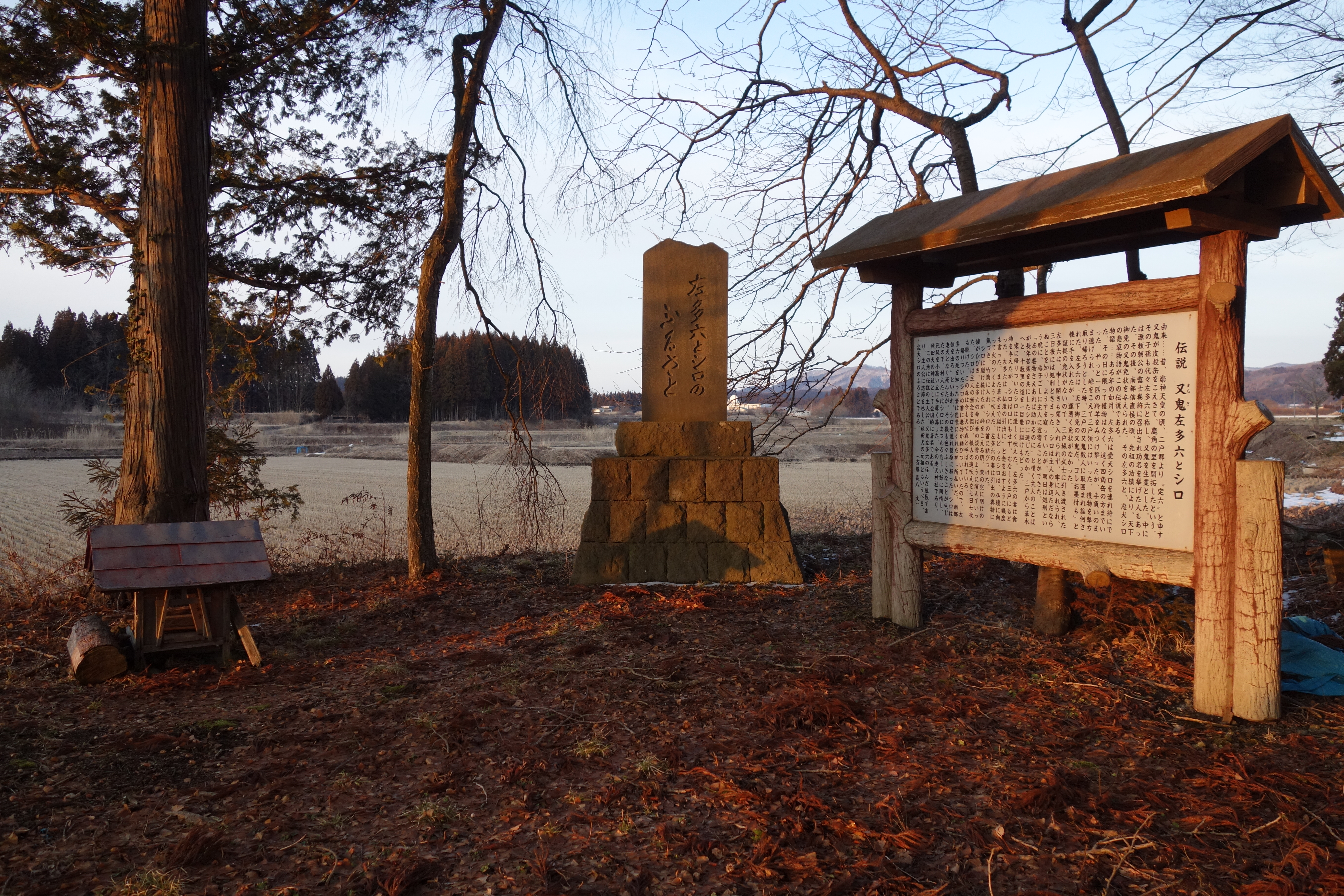 秋田県鹿角市十和田草木下草木にある左多六神社と石碑